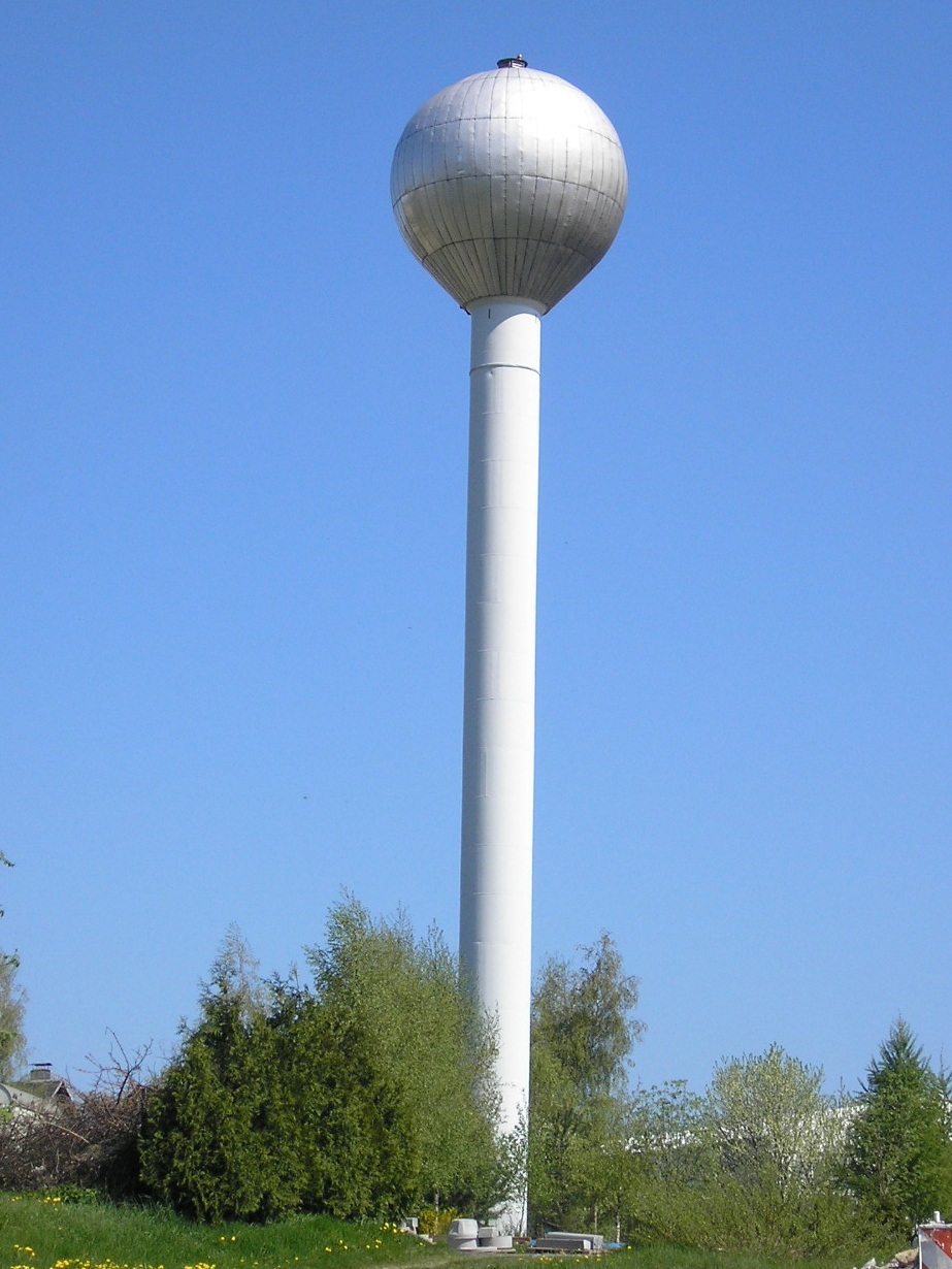 Wasserturm auf der Pörlitzer Höhe nahe Unterpörlitz (Thüringen).